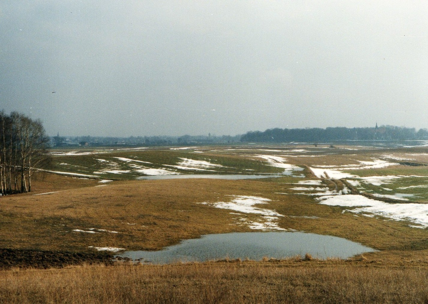 Przedwiośnie w gminie Łobżenica w 1996 roku.